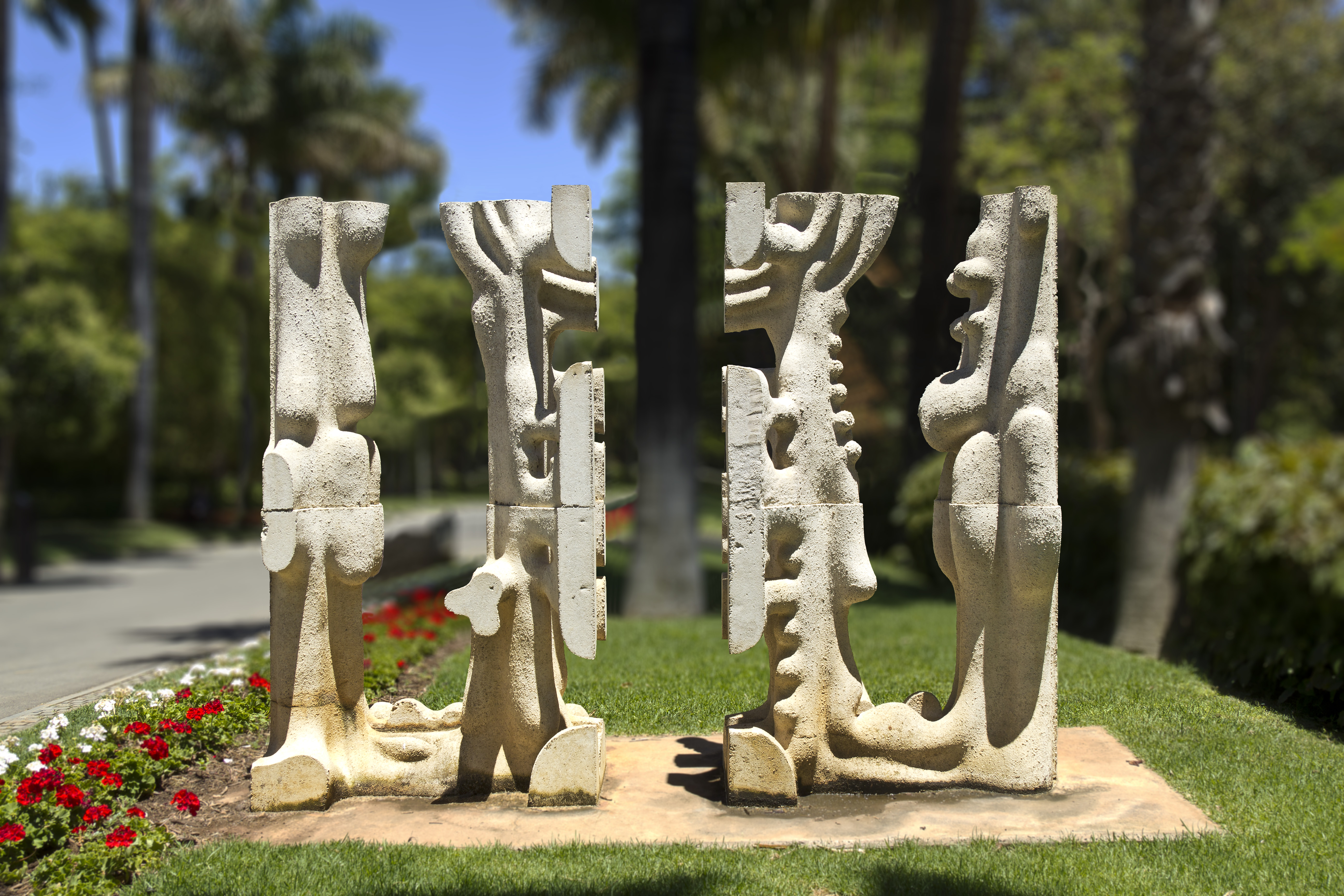 Die Skulptur des 1929 in Santiago de Chile (Chile) geborenen Künstlers Federico Assler wurde im Jahr 1973 im Rahmen der „Exposición Internacional de Escultura en la Calle“ der Architektenkammer der Kanarischen Inseln im Parque García Sanabria aufgestellt. Die Maße sind 235 cm x 300 cm x 77 cm.